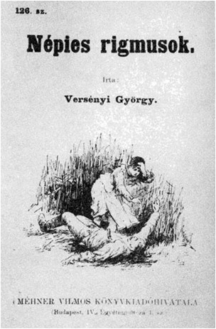 A Népies rigmusok címlapja